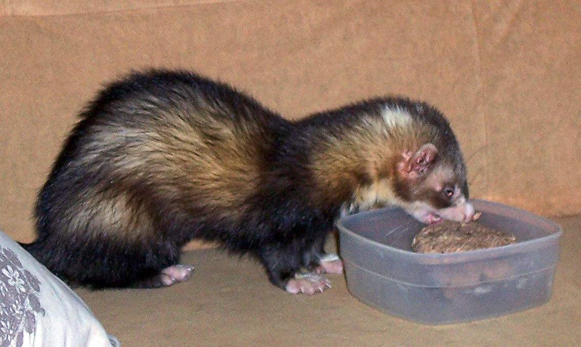 Mustela putorius furo